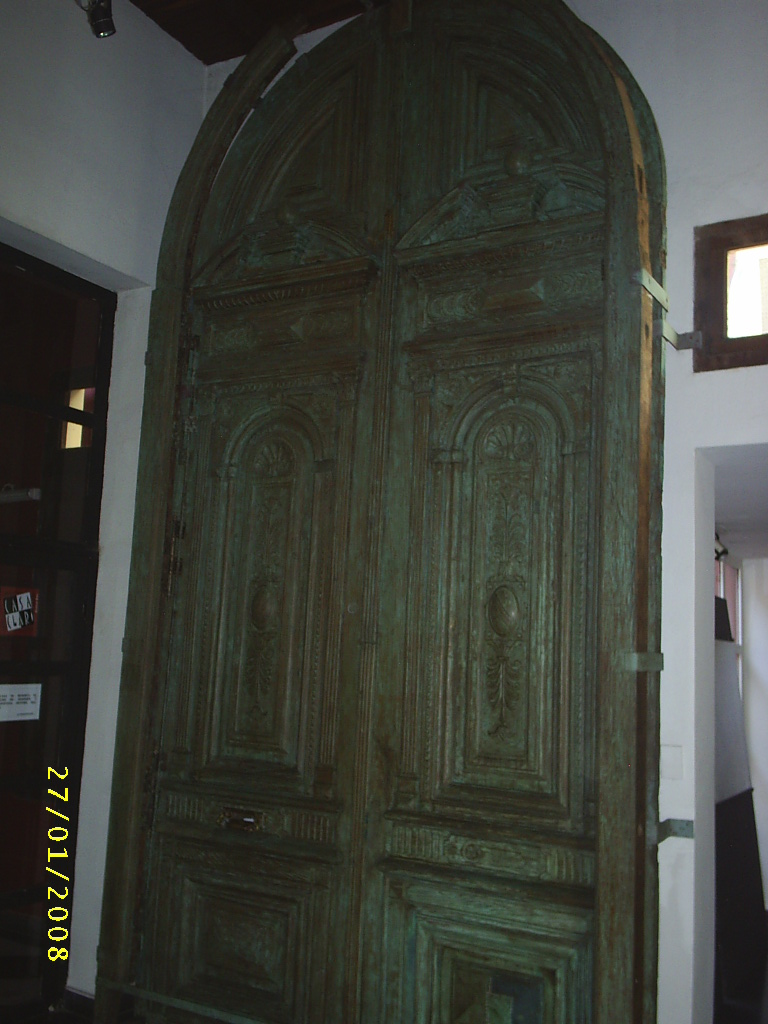 Puerta de madera tallada. Club Nacional. 1860